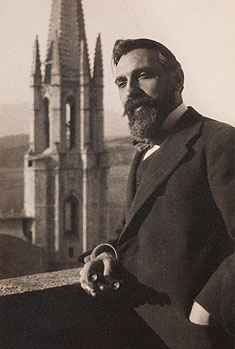 Rafael Masó, avec en toile de fond le clocher de Sant Feliu